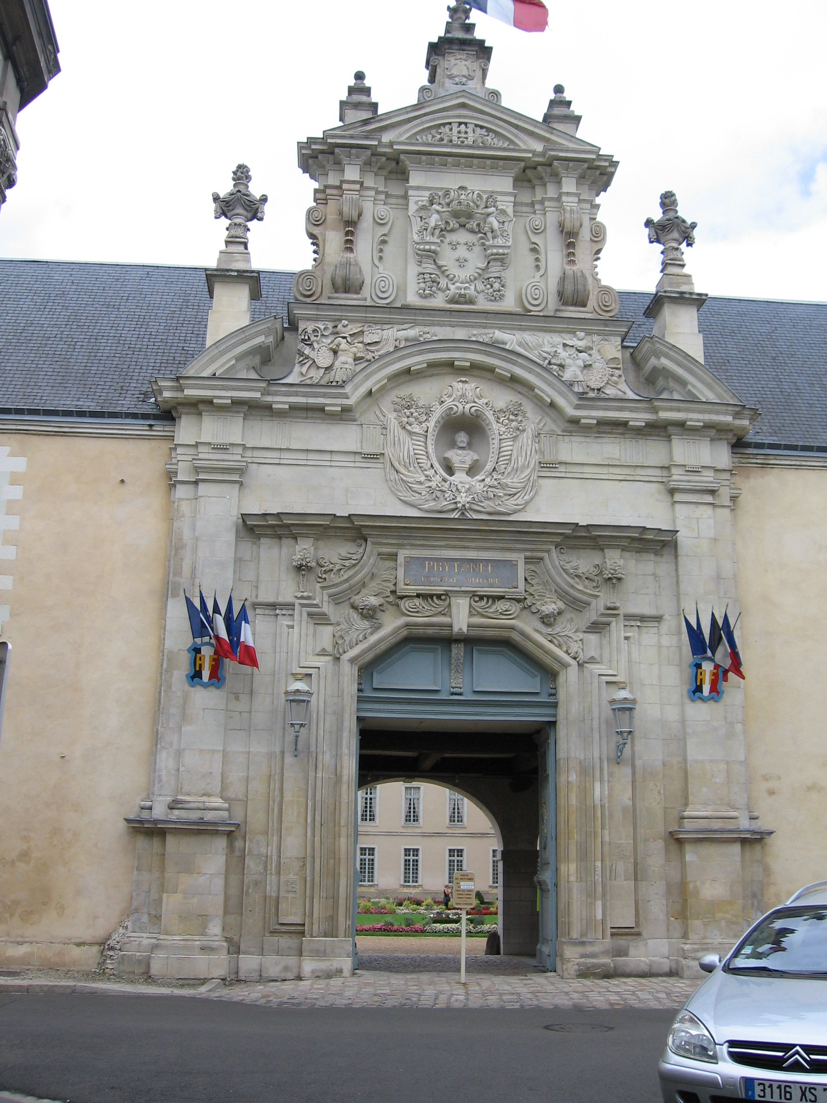 Portail de l'ancien collège jésuite Henri IV, à La Flèche (Sarthe), maintenant Prytanée national, Aout 2008